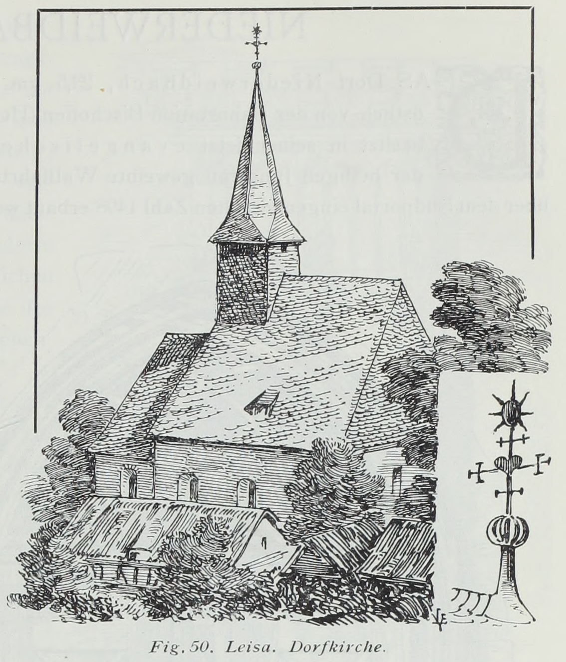 Leisa. Dorfkirche, Ansicht und Turmkreuz Die Zeichnung illustriert einen Text zur Dorfkirche Laisa: Die Dorfkirche von Leisa, 12 km nordöstlich von Biedenkopf, 2,5 km südlich von Battenberg, dürfte ihre Entstehungszeit an einen 1296 erteilten Ablass knüpfen, wenn auch die primitiven Formen des Schiffs keine genauere Bestimmung zulassen. Der Chor ist laut Inschrift 1723 erbaut. Das Langhaus ist durch zwei sehr nahe an die Seitenwände gerückte Rundpfeiler mit schlichtem Schmiegengesims in drei gleichhohe Schiffe geteilt, mit rippenlosen, roh gemauerten Gewölben, deren Gräte im Scheitel kuppelartig zusammenlaufen. Von den ursprünglichen kleinen Rundbogenfenstern ist nur in der Nordwand eins erhalten. Nach Westen schliesst sich an das Langhaus ein flachgedeckter schmaler Raum, der in der Westwand drei Schiesscharten hat. Der Chorbogen ist spitzbogig und ungegliedert. Über ihm ein viereckiger, beschieferter Dachreiter mit ins Achteck übergeführtem Helm; auf dem First des Chordachs eine eiserne Spitze mit sogenanntem Wiederkreuz, Herz und Sonne. Ferdinand Luthmer